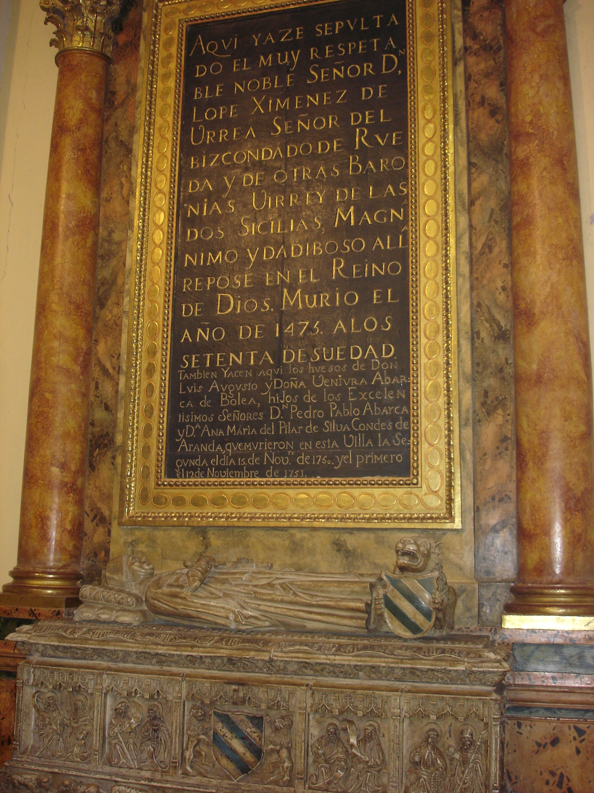 Tumba de Don Lope Ximénez de Urrea, padre del primer Conde de Aranda, en la Iglesia de Santa María la Mayor, Épila, provincia de Zaragoza, Aragón, España.